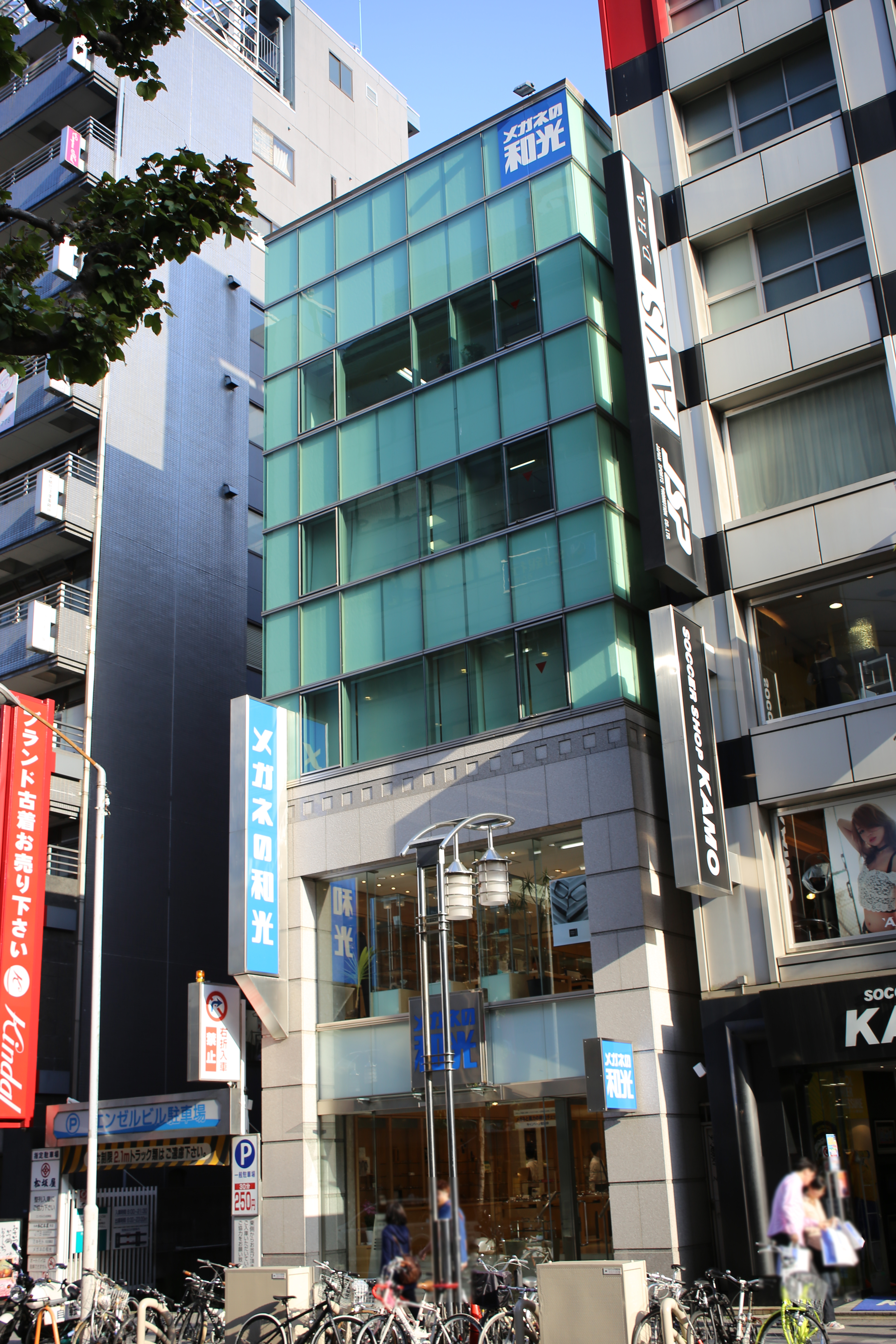 名古屋市中区栄三丁目の栄メガネビル（メガネの和光本社）を北側公道西側より撮影。ただし、人物につき画像処理済み。